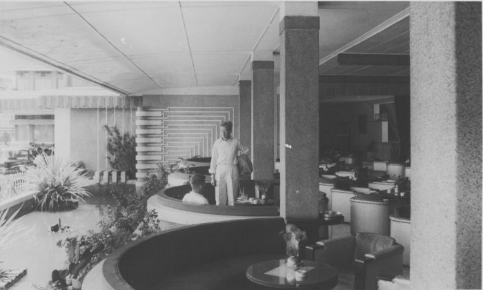 foto. Het Savoy Homann Hotel